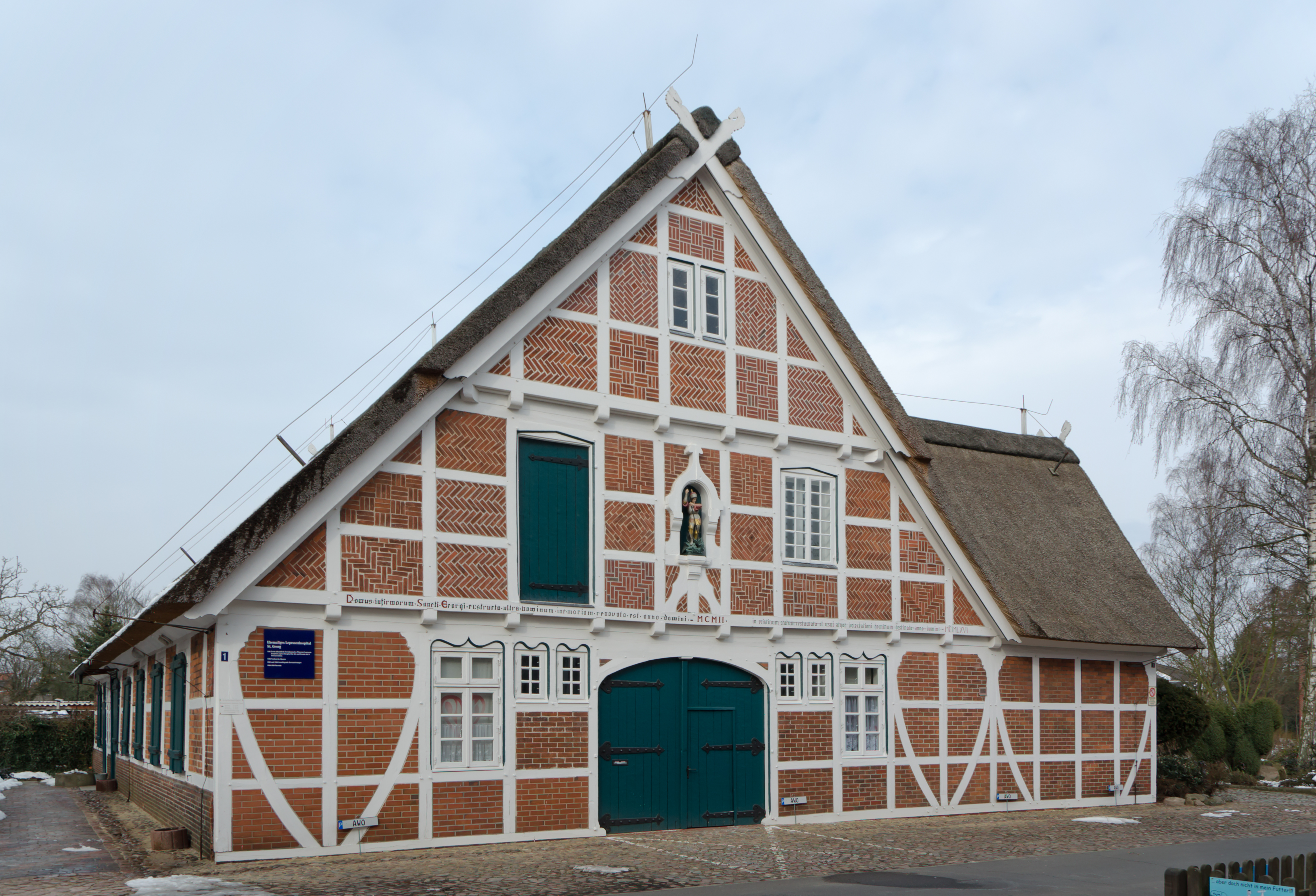 Winsen St Georghospital